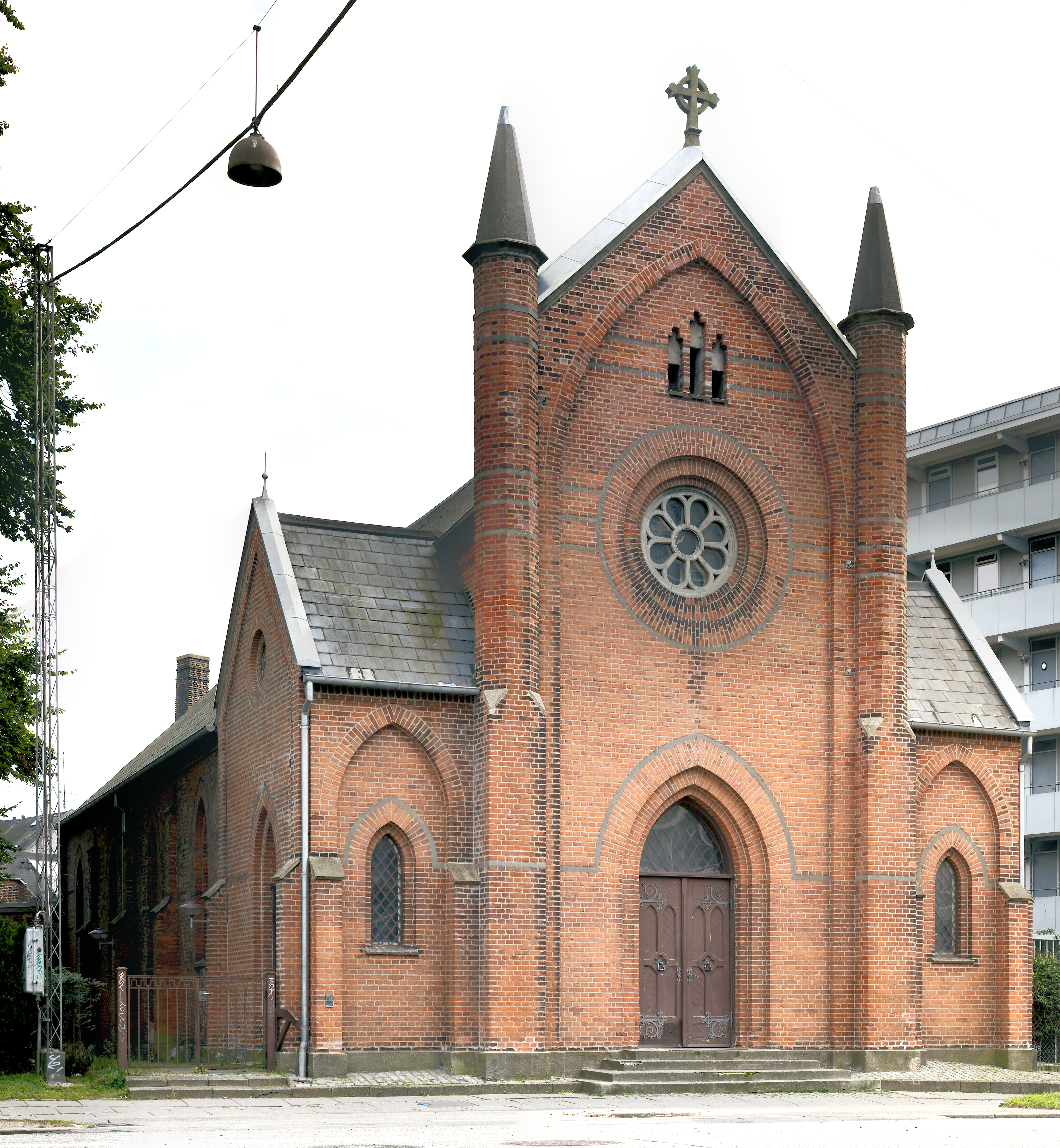 Sankt Nikolaj Kirke (Aarhus)